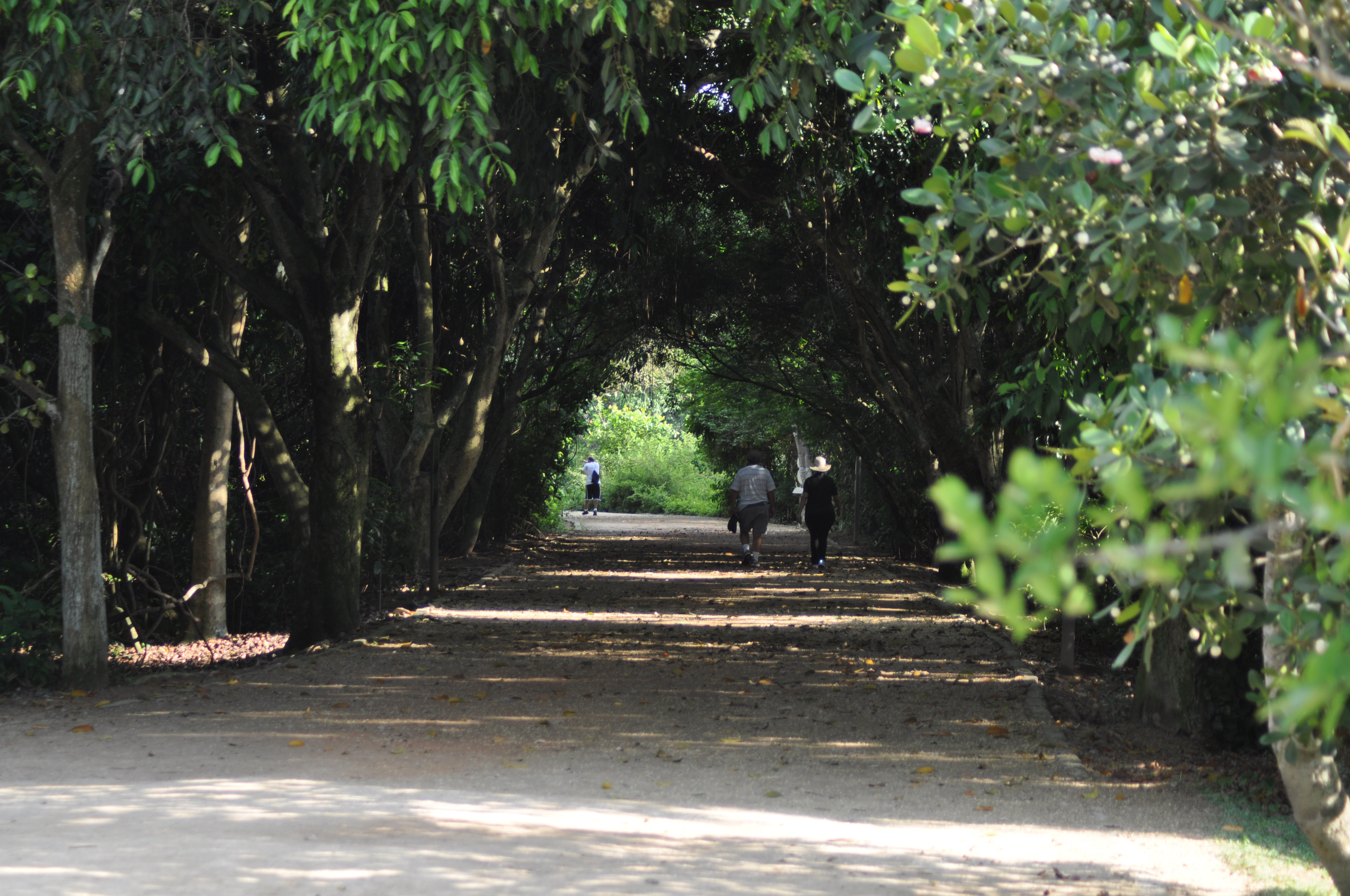 Nikon D90 Lente 50mm